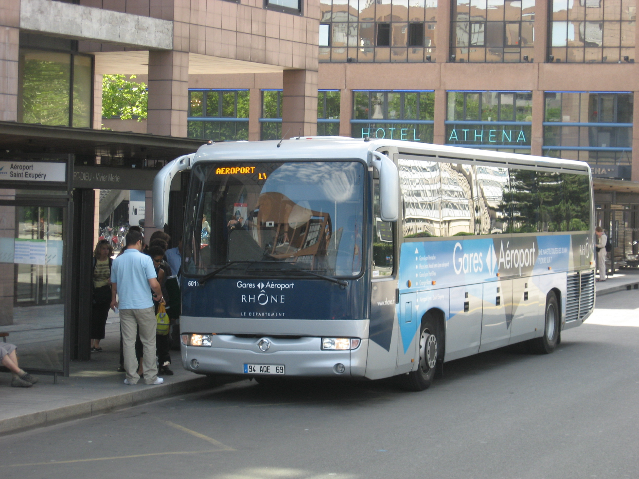 Busdienst naar de luchthaven in Lyon Part-Dieu